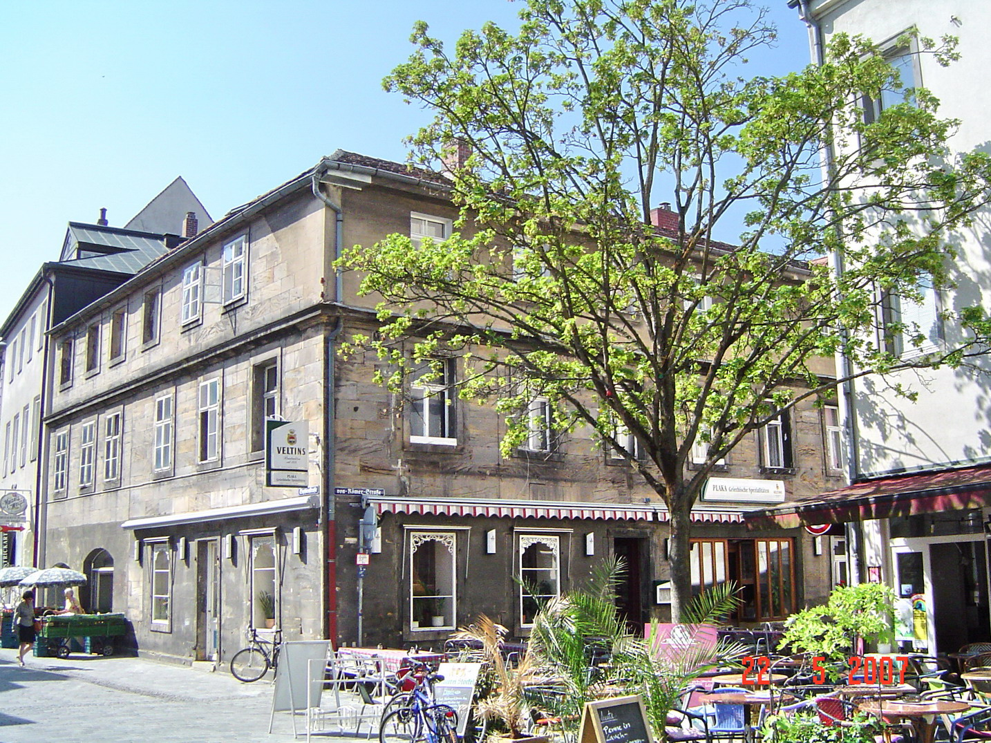 Bayreuth, Burggut Plassenburg, Sophienstr.22